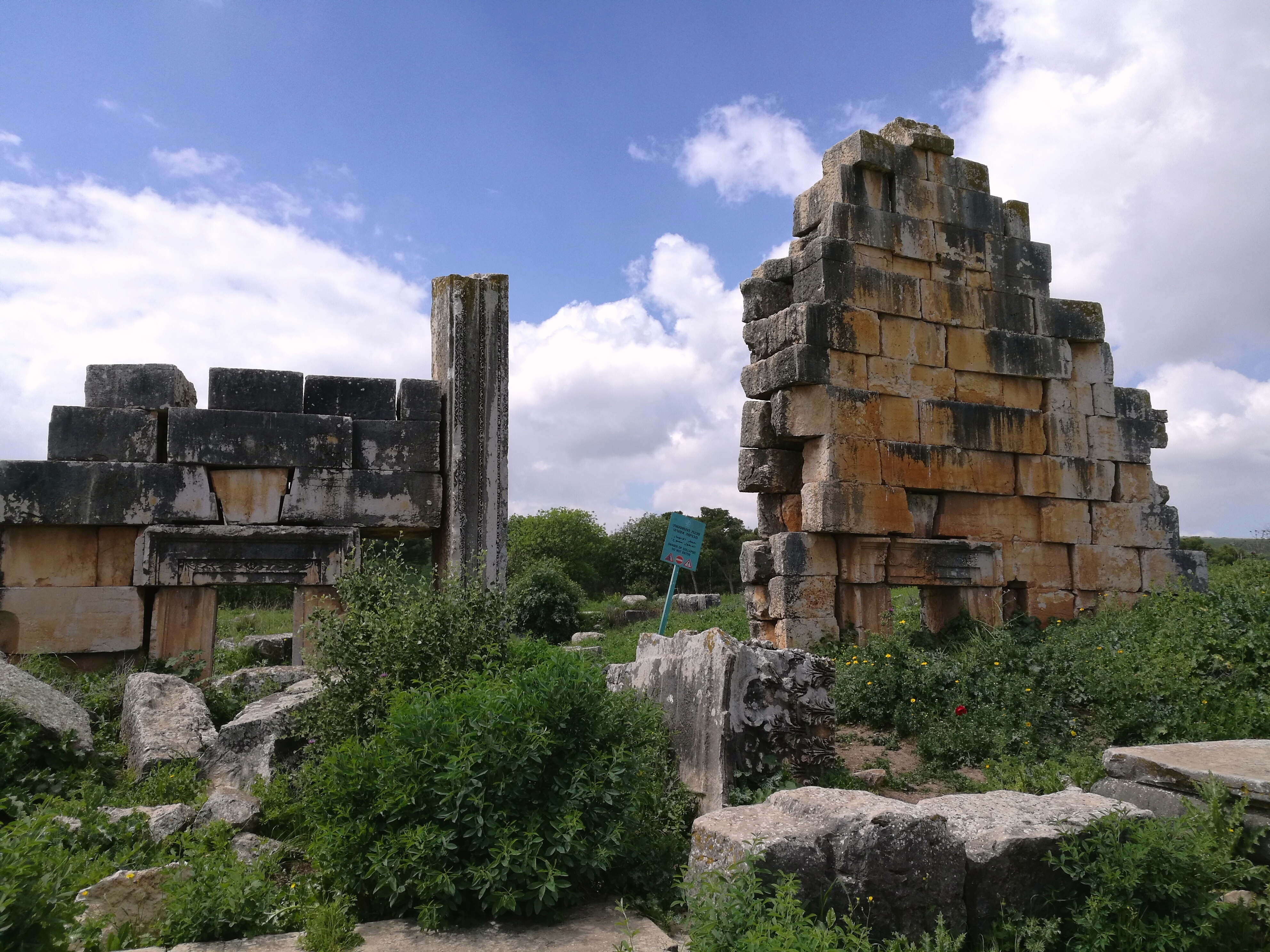 מראה כללי של המקדש הרומי בתל קדש.